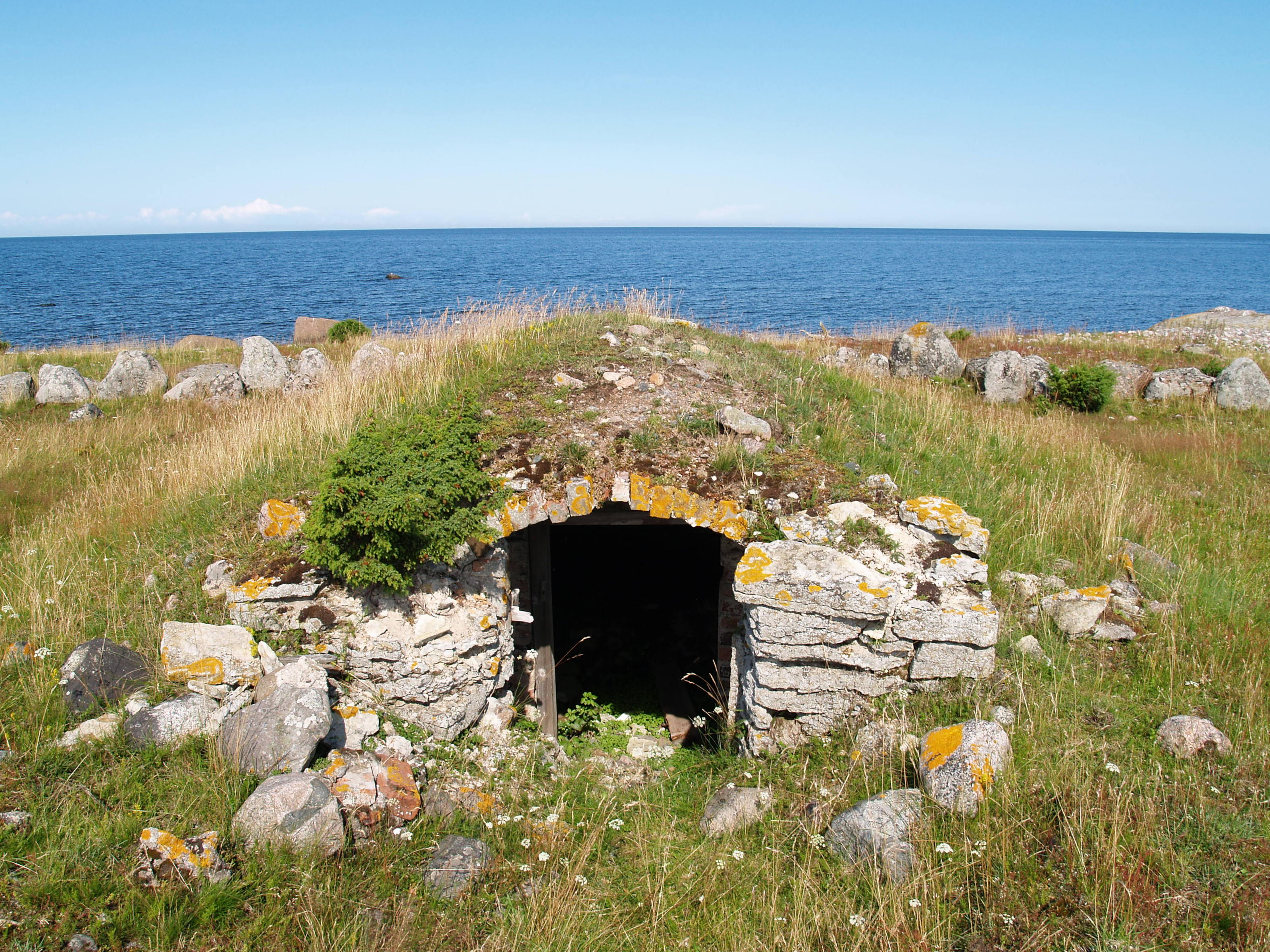 Vana kelder Aksi saarel.